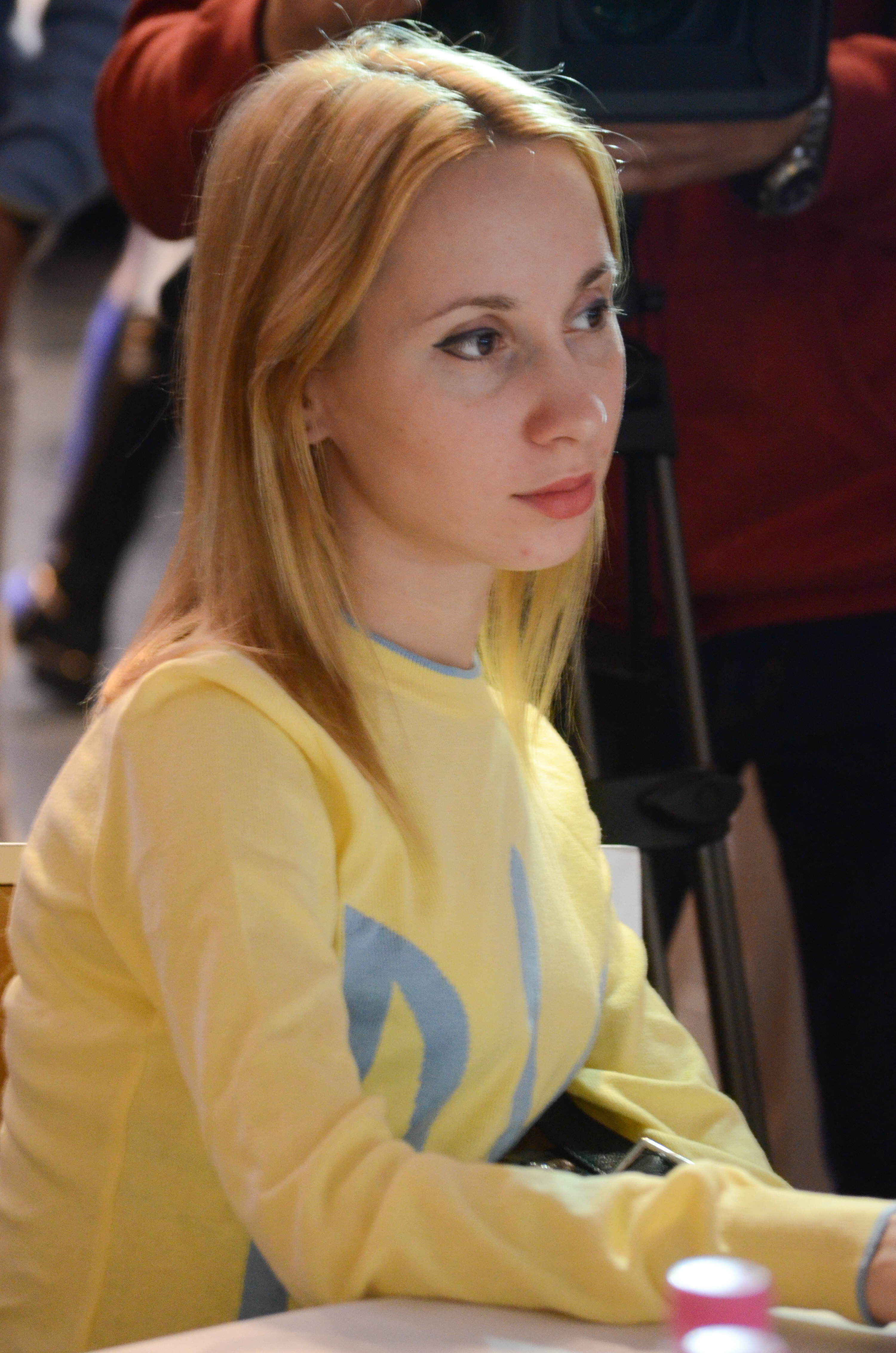 Зустріч Президента України з олімпійцями та паралімпійцями — учасниками Ріо-2016.